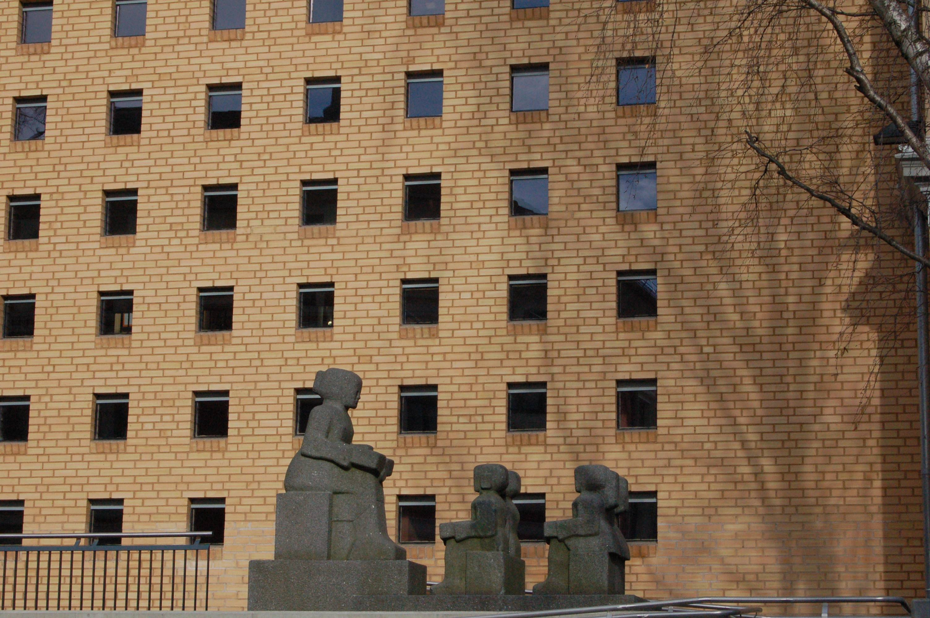 Image of statue depicting Helga Helgesen outside Kampen skole, Oslo